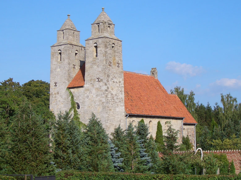 Tveje Merløse Kirke, Holbæk